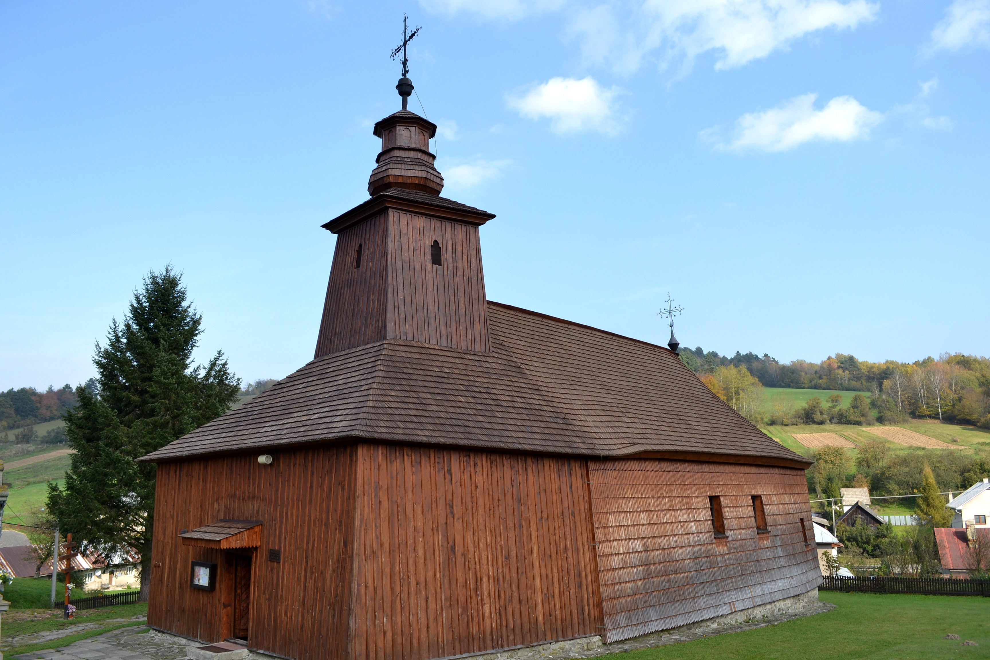 Celkový pohľad na kostolík od juhozápadu